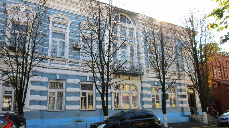 Здание библиотеки до 1965 года